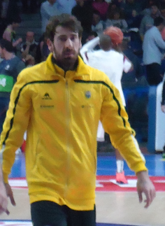 Fotios Lampropoulos en marzo de 2015